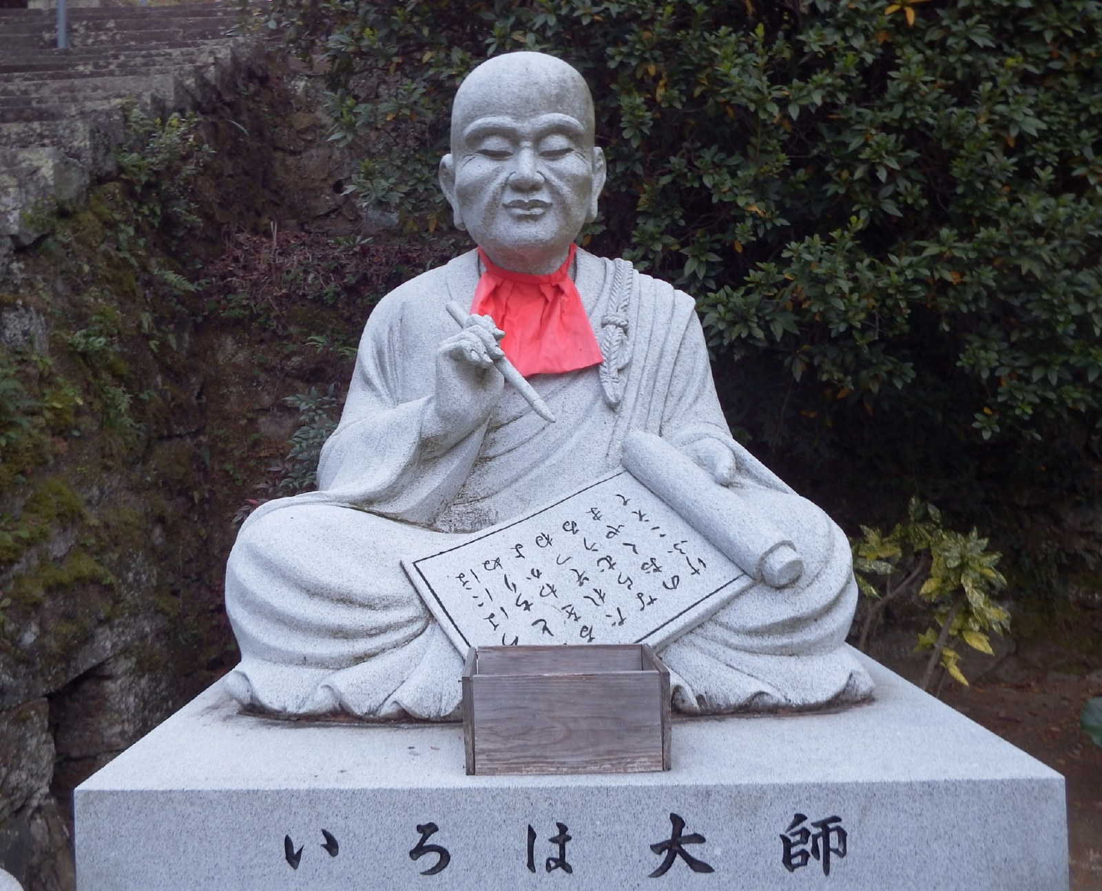 童学寺のいろは大師